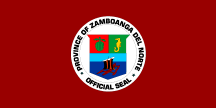 Dit materiaal is afkomstig van of en is door de auteur Jaume Ollé als GFDL beschikbaar gesteld, zie de toestemmingsemail. Hiermee vervallen de strictere voorwaarden in de disclaimers op de genoemde sites.Vrijgegeven bijdrage op Flags of the World van Jaume Olle. Zie deze verklaring op de Spaanstalige Wikipedia. GNU FDL